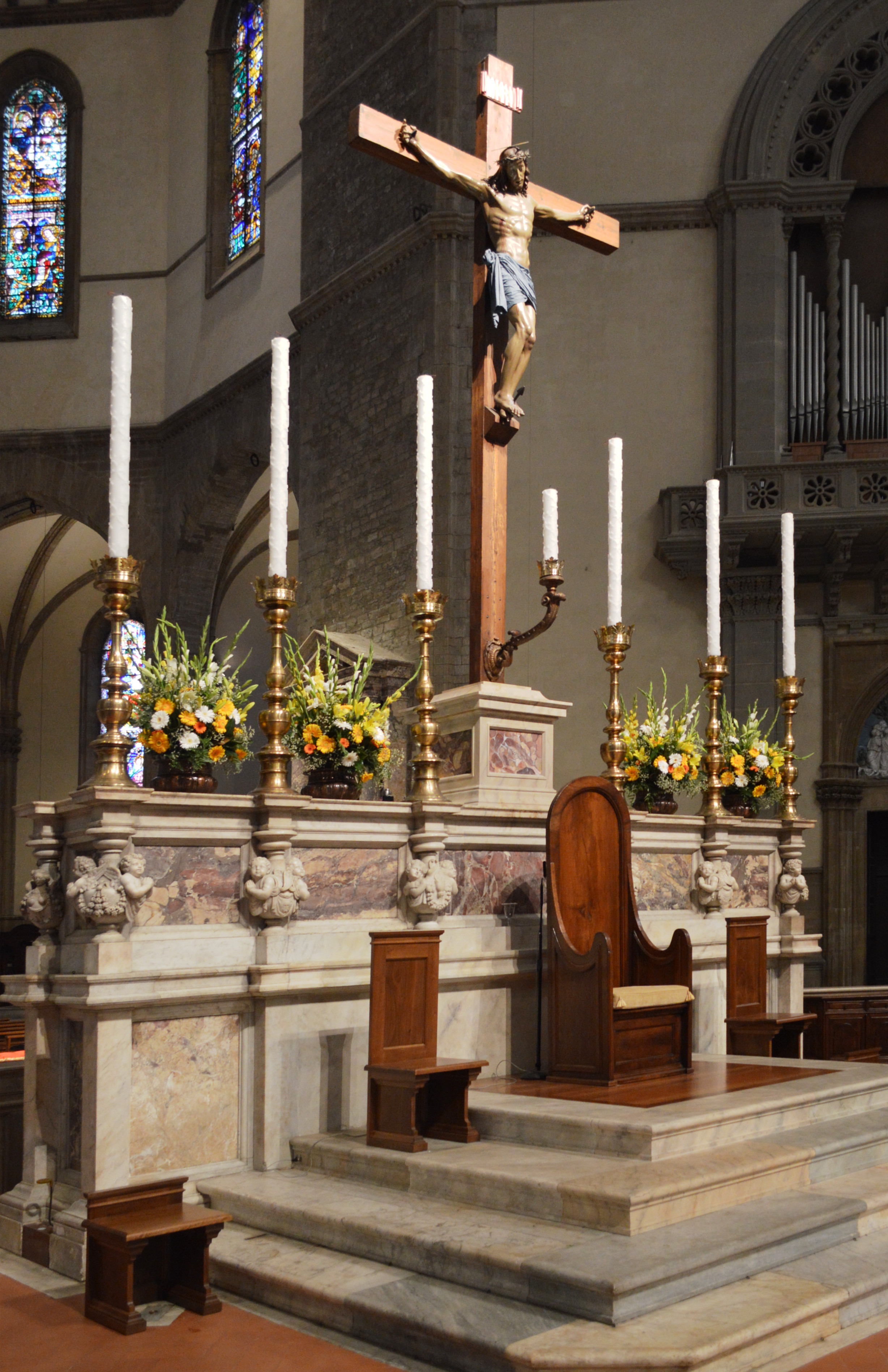 Il dossale bandinelliano con la cattedra e il Crocifisso di Benedetto da Maiano.